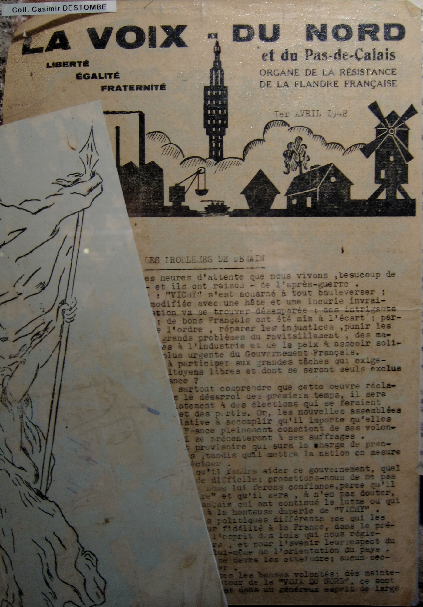 L'édition clandestine du 1er avril 1942 de la Voix du Nord au musée de la Résistance de Bondues (Nord).